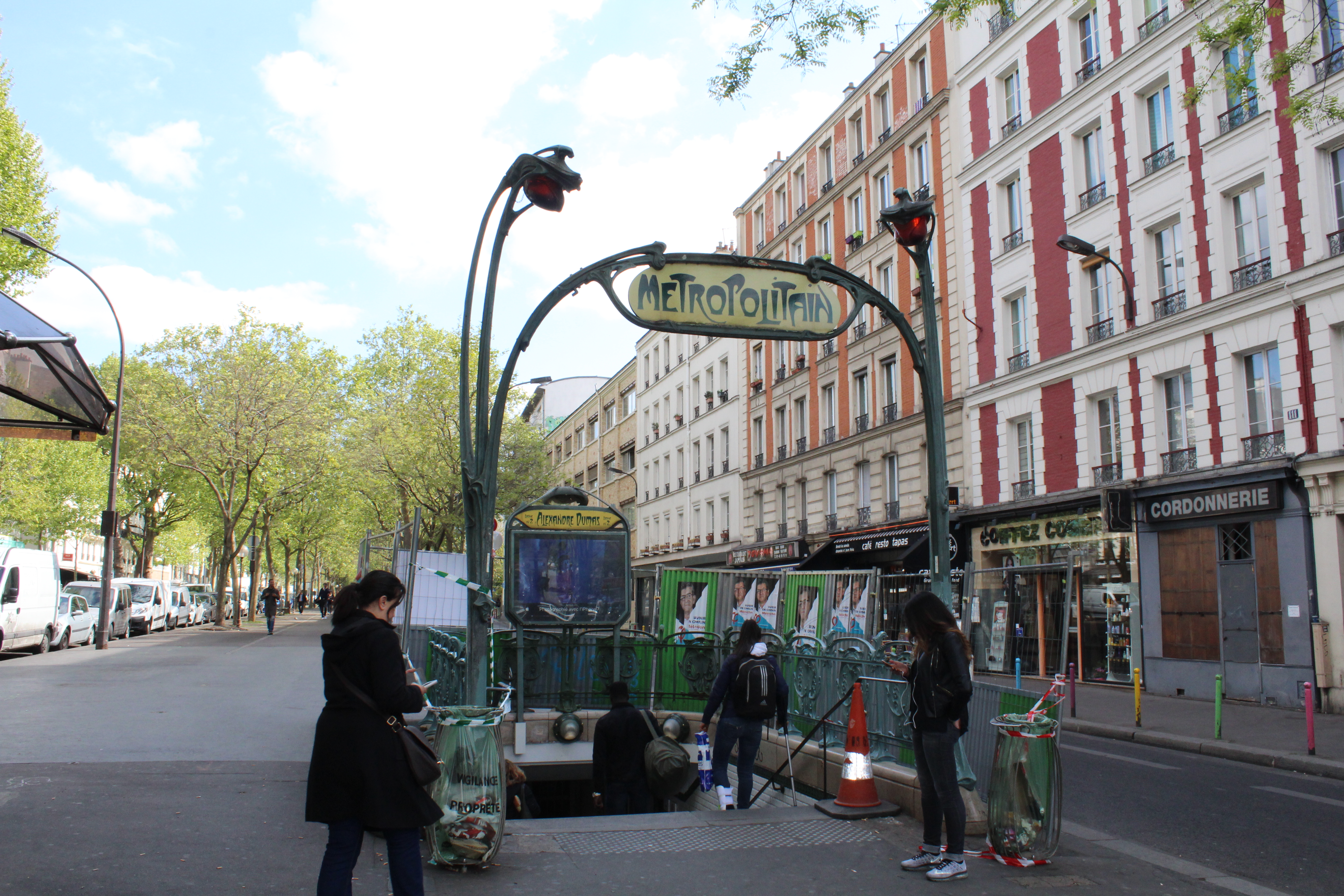 Entrée de la station de métro Alexandre Dumas à Paris.